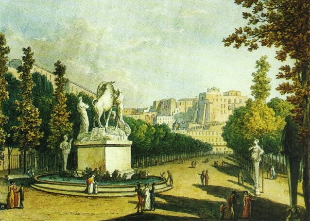 Napoli, Villa Reale (oggi Villa Comunale). Statua del Toro Farnese nella Fontana delle Quattro Stagioni (portato da Roma a Napoli nel 1788; trasferito nel Museo Nazionale nel 1824).